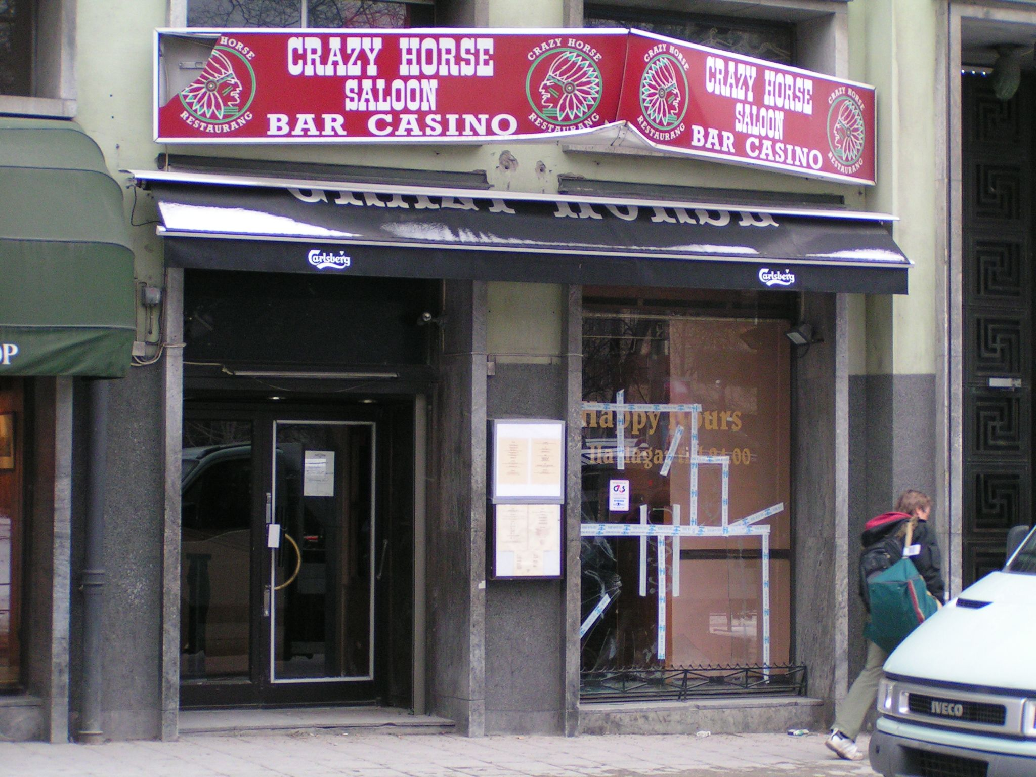 Crazy Horse, Stockholm, 8 february 2007